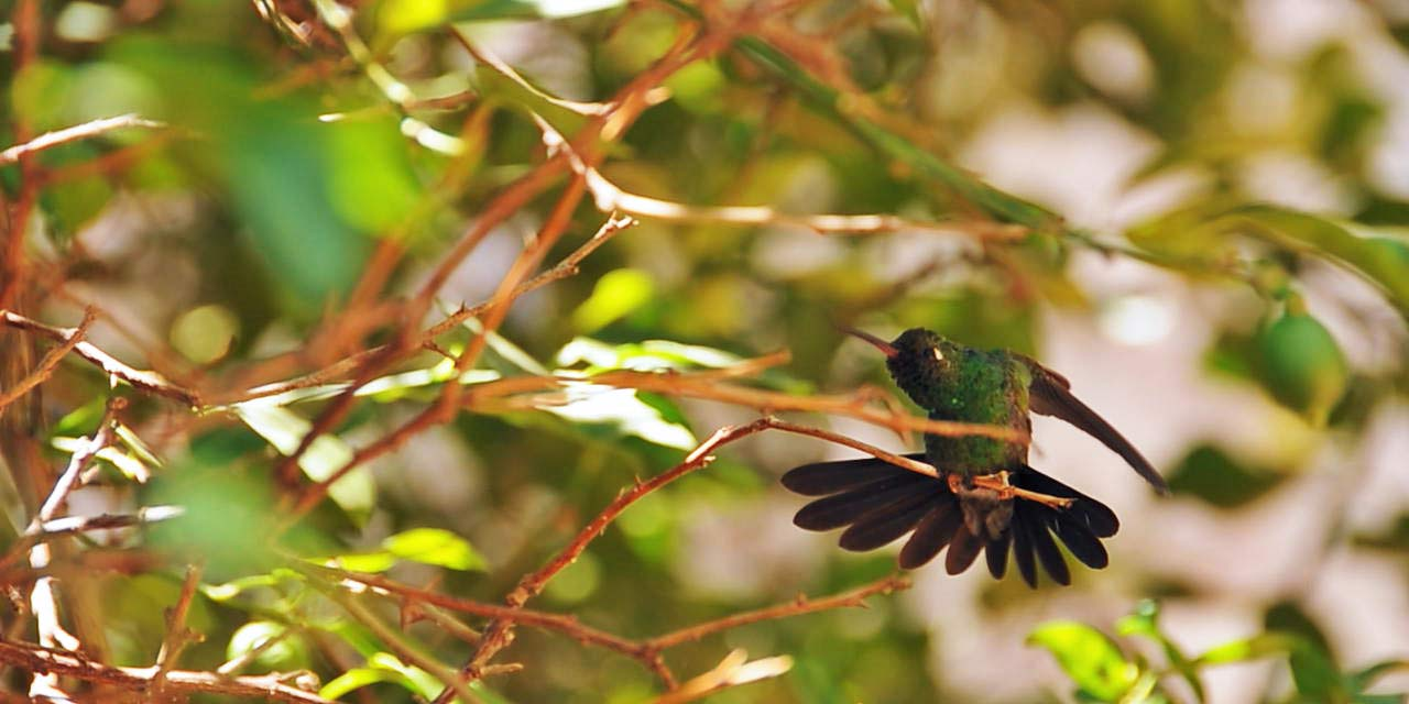 Chlorostilbon ricordii, captura de pantalla la frame 28025 de mi documental "Zunzún"